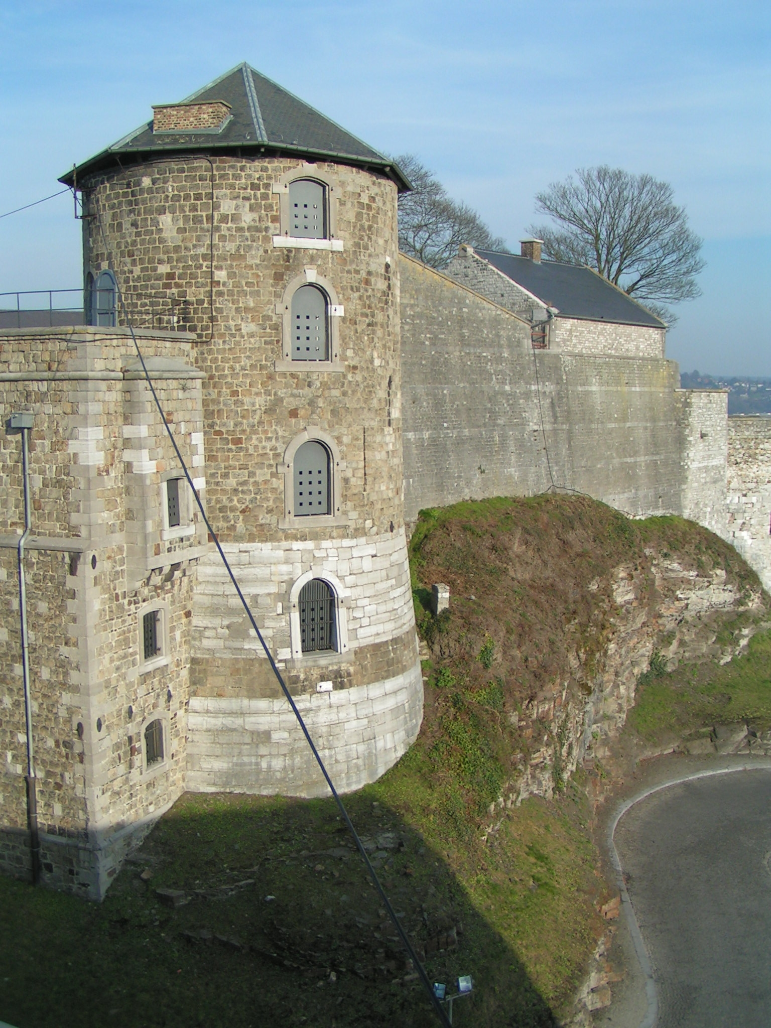 Citadelle de Namur, Belgique.